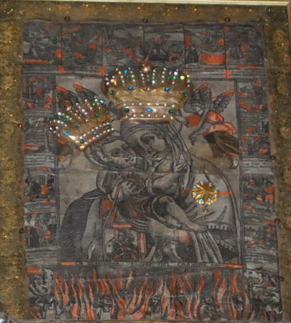 Szűz Mária papírnyomat oltárképe a máriaradnai kegytemplomban, Erdély